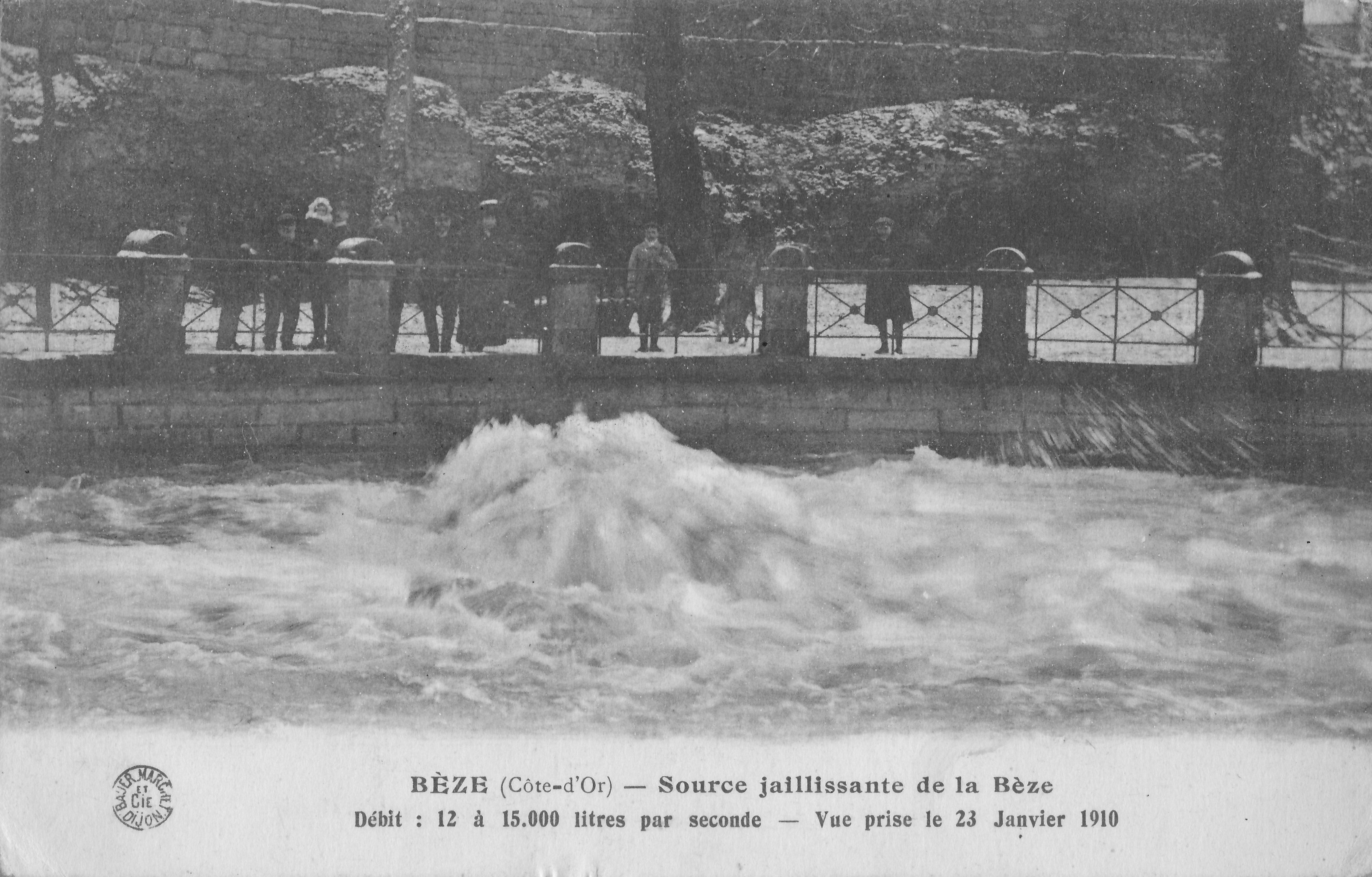 Carte postale ancienne montrant la source jaillissante de la Bèze vers 1910